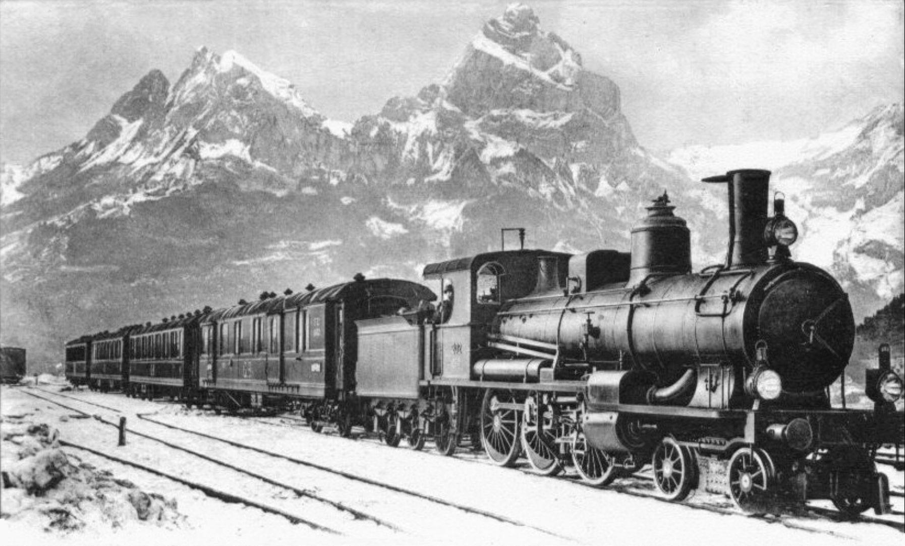 Gotthard-Express Luzern-Mailand mit Lokomotive A 3/5 Nr. 202 der Gotthardbahn-Gesellschaft und neuen Vierachsern 1. und 2. Klasse von Van der Zypen & Charlier, Köln-Deutz. Während die Lokomotiven vom Gebirgscharakter der Gotthardstrecke geprägt waren, spielte beim Wagenmaterial die internationale Bedeutung der Linie die zentrale Rolle. Die Reisezugwagen der Gotthardbahn zeichneten sich von Anfang an durch einen besonders hohen Komfort aus.